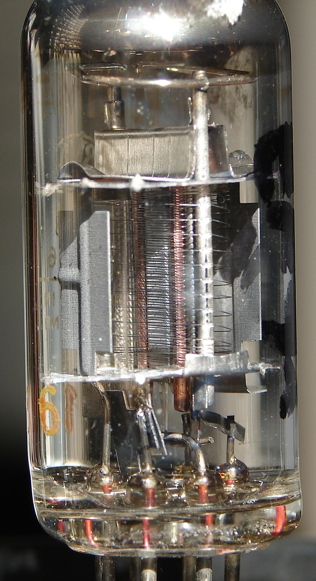 Radioröhre EF91 in detaillierter Ansicht